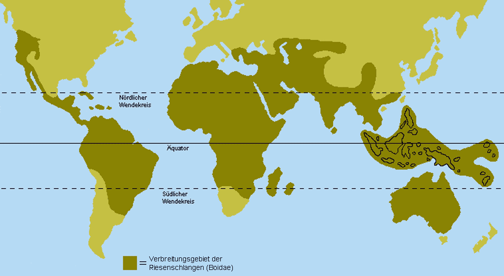 Description: Boidae Founds / Verbreitung der Riesenschlangen (Boidae) Source: own work Date: 14.04.2006 Author: Jens Raschendorf = Baumpython